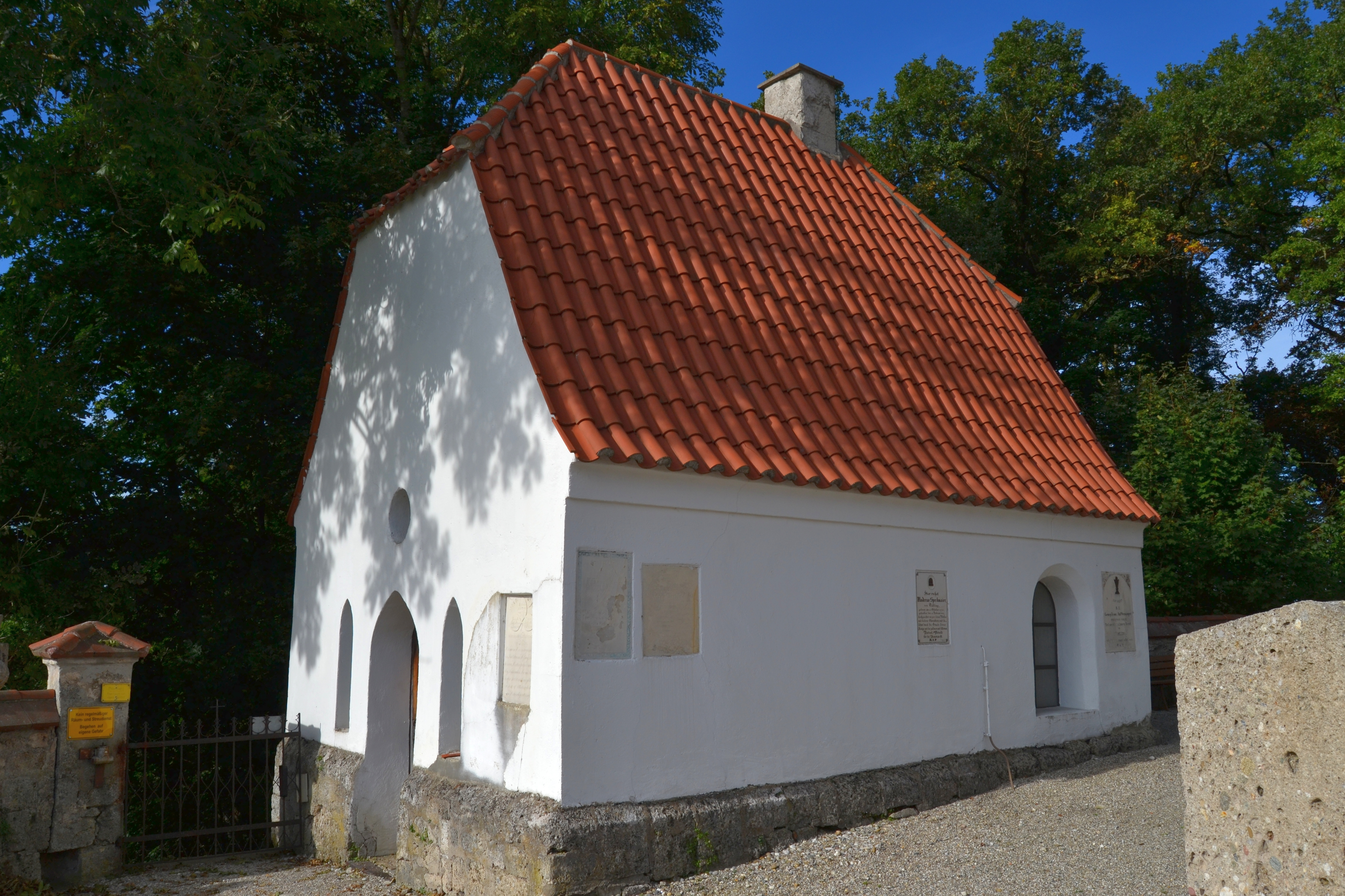 Karner der Katholischen Pfarrkirche St. Rupertus, Burgkirchen a.Wald (zu Tüßling), spätgotische zweischiffige Hallenkirche, gegen Mitte 15. Jahrhundert; mit Ausstattung; dazu ehemaliger Karner, mit Krüppelwalmdach, 15. Jahrhundert, im KirchfriedhofThis is a photograph of an architectural monument.